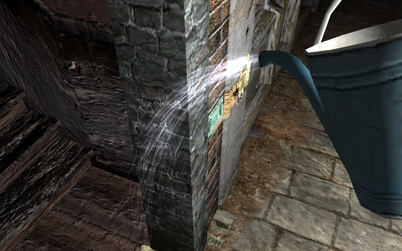 Capture d'écran du jeu Sherlock Holmes contre Jack l'Éventreur. Il s'agit ici de l'inscription tracée à l'entrée d'un immeuble de Goulston Street après le meurtre de Catherine Eddowes : « The Juwes are not the men that will be blamed for nothing ». Ici, Sherlock Holmes réalise une expérience à l'aide d'un arrosoir pour reconstituer le temps pluvieux du 30 septembre au petit matin.